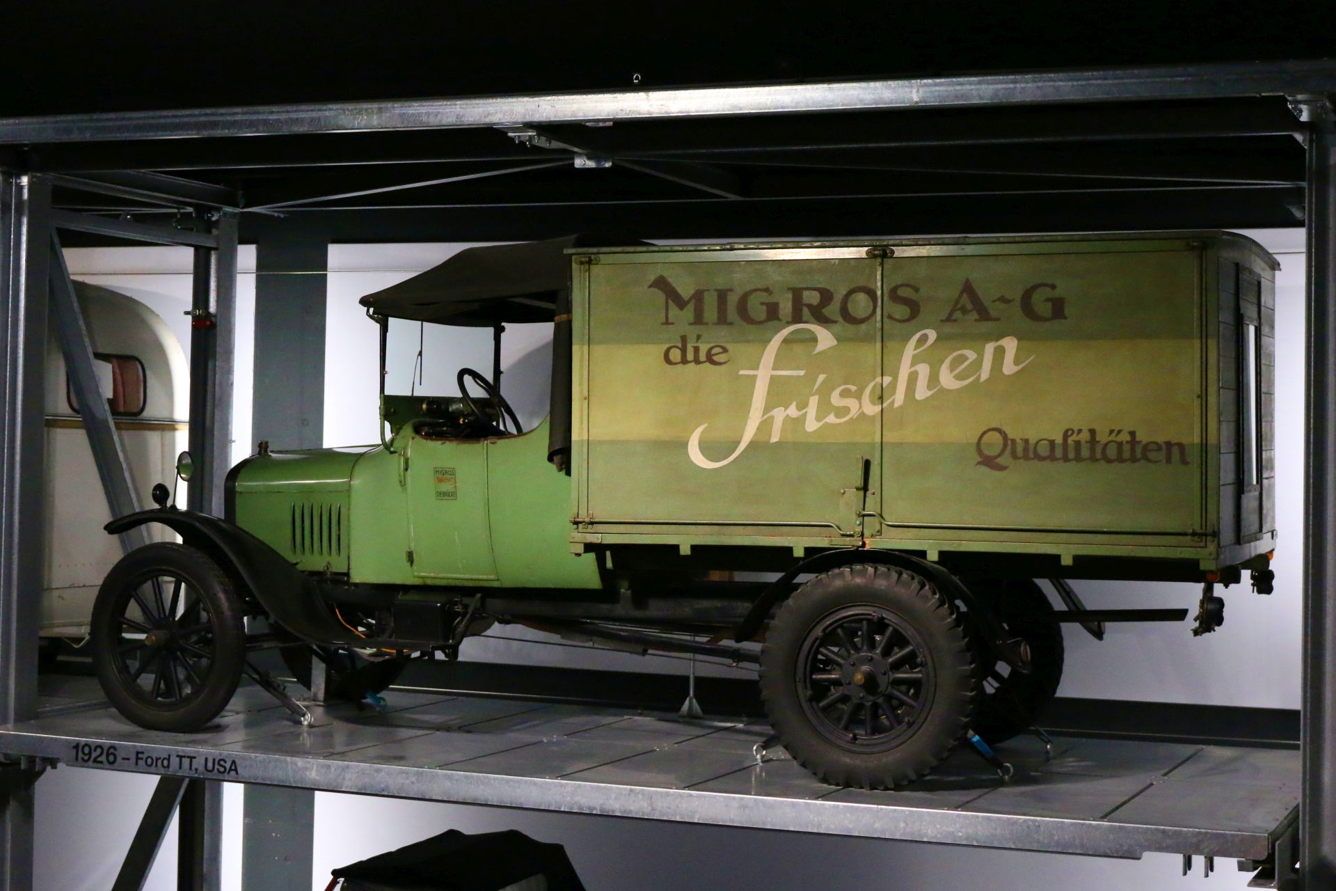 Ford TT z roku 1926 švajčiarskej spoločnosti Migros. Je súčasťou zbierky múzea dopravy v Luzerne.